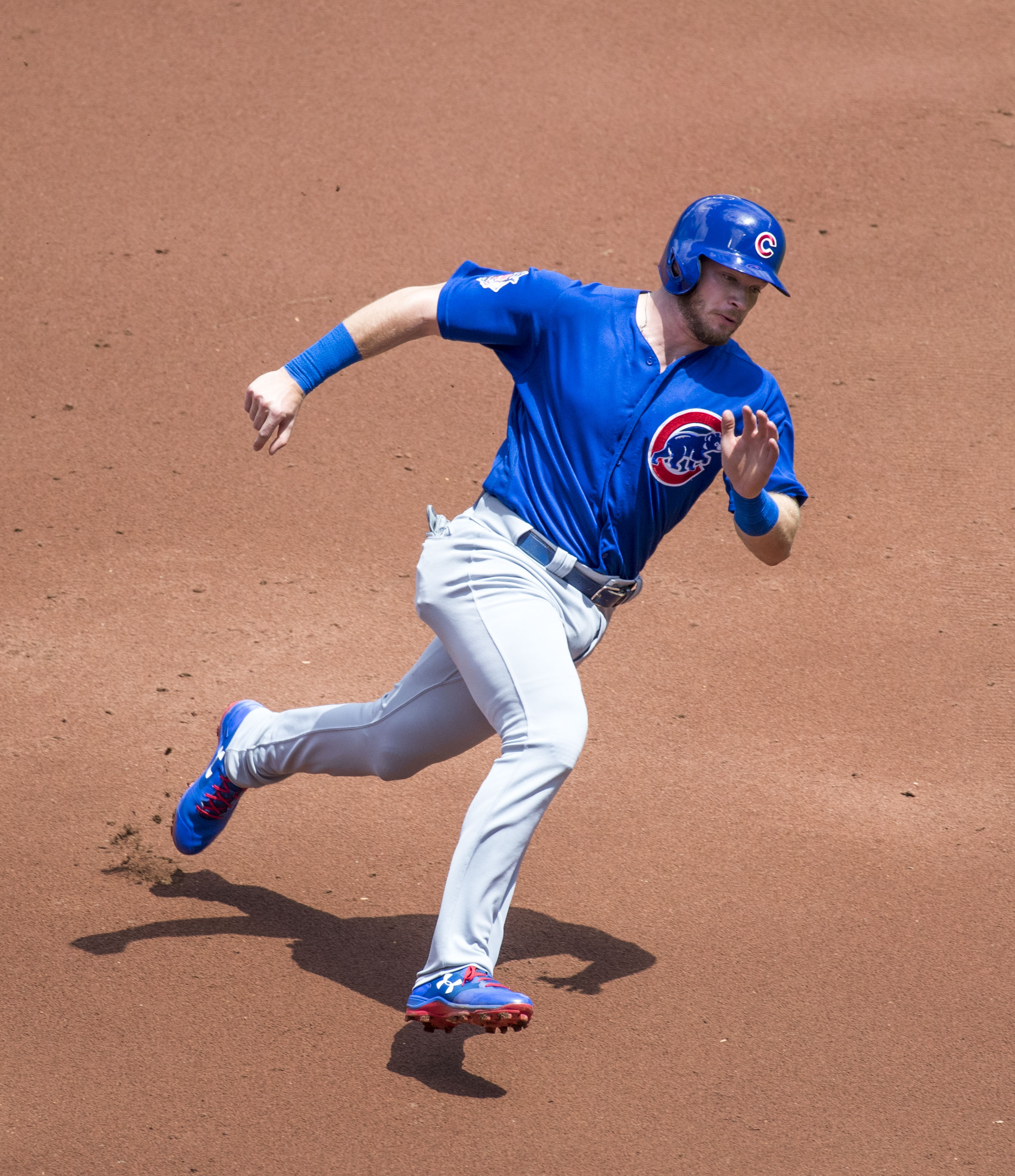 Cubs at Orioles 7/16/17